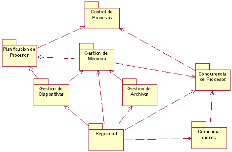 Componentes de Sistemas Operativoss